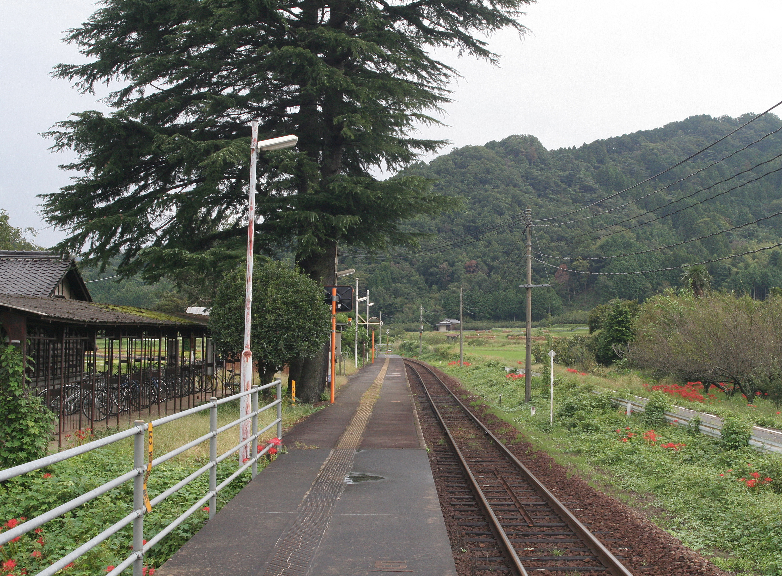 西日本旅客鉄道 JR因美線 国英駅構内